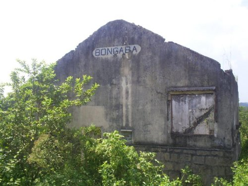 Estação Bongaba em ruínas. Pouca coisa restou depois que a estação saiu da lista do contrato de concessão, já que o abandono fez com que seus telhados, portas, janelas e estruturas de madeira fossem furtados.